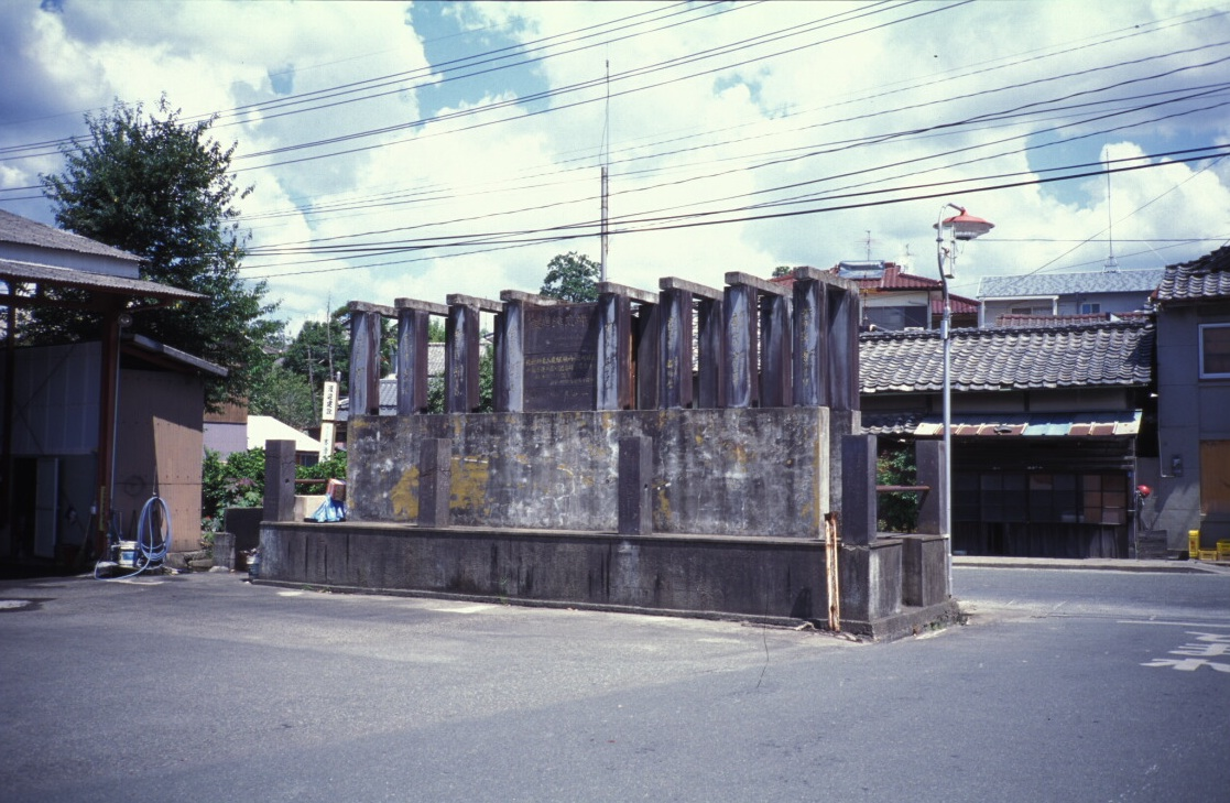 山鹿駅前の鉄道記念碑